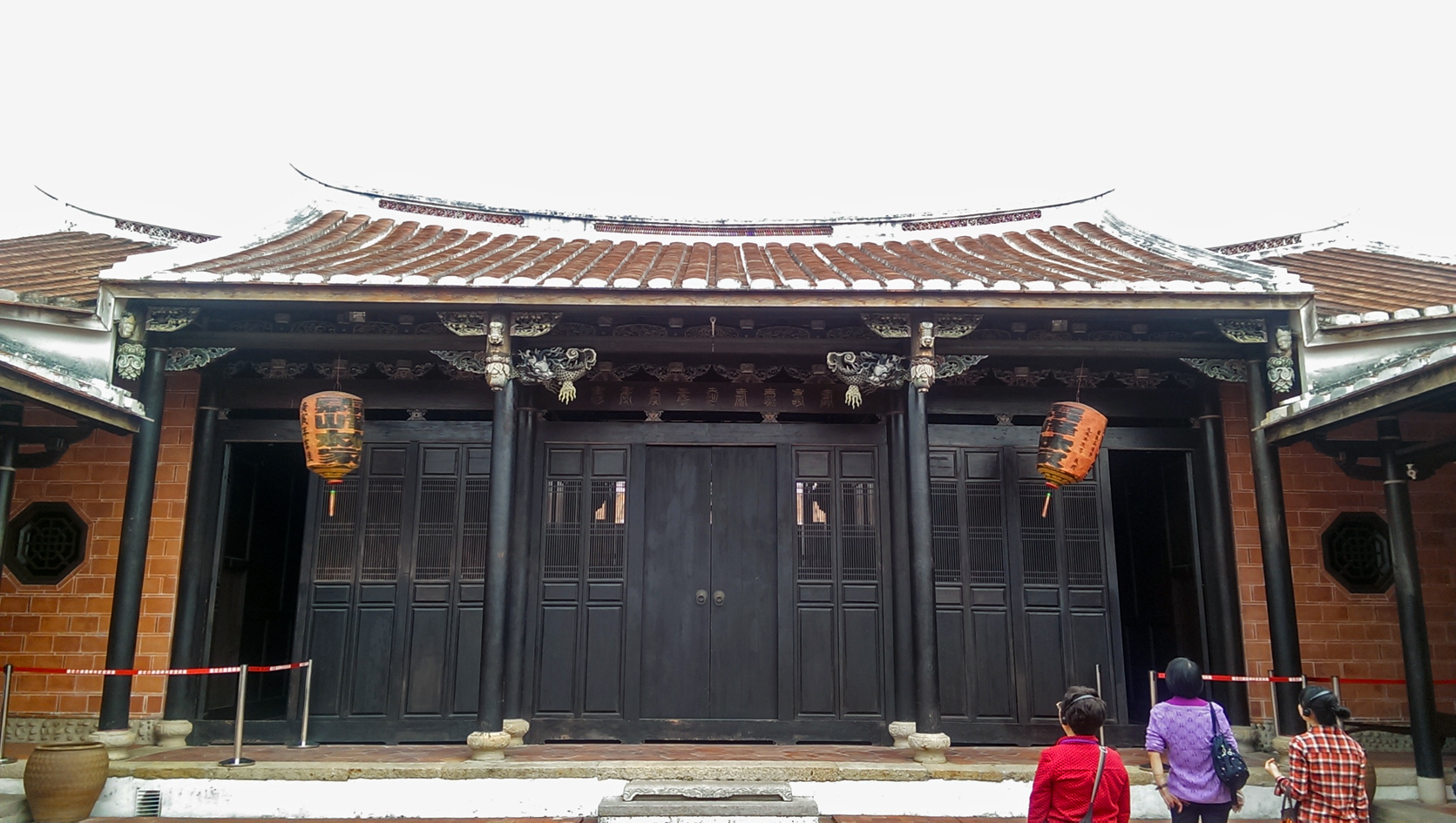 霧峰林家宮保第第二進